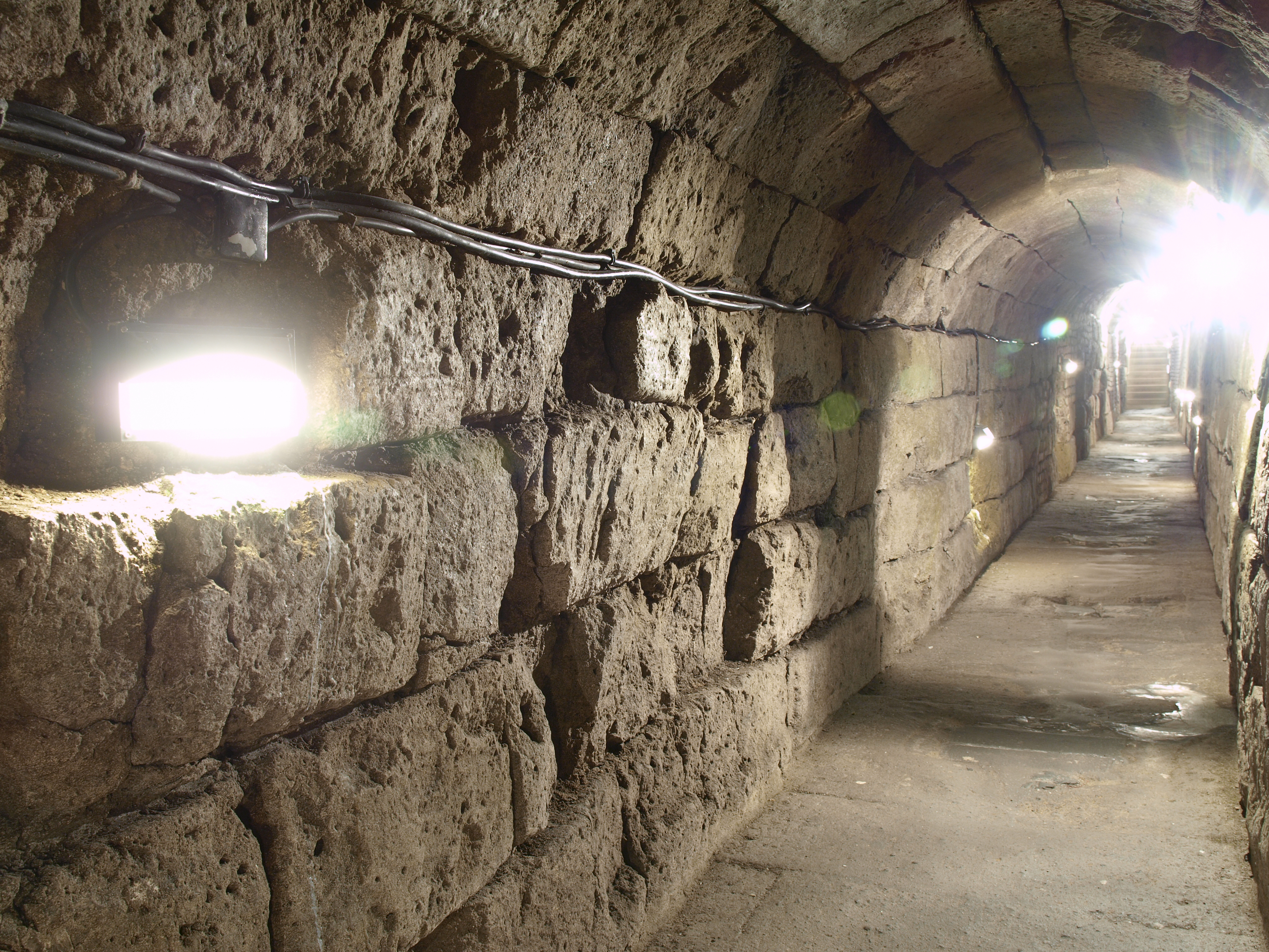 Der römische Abwasserkanal in Köln